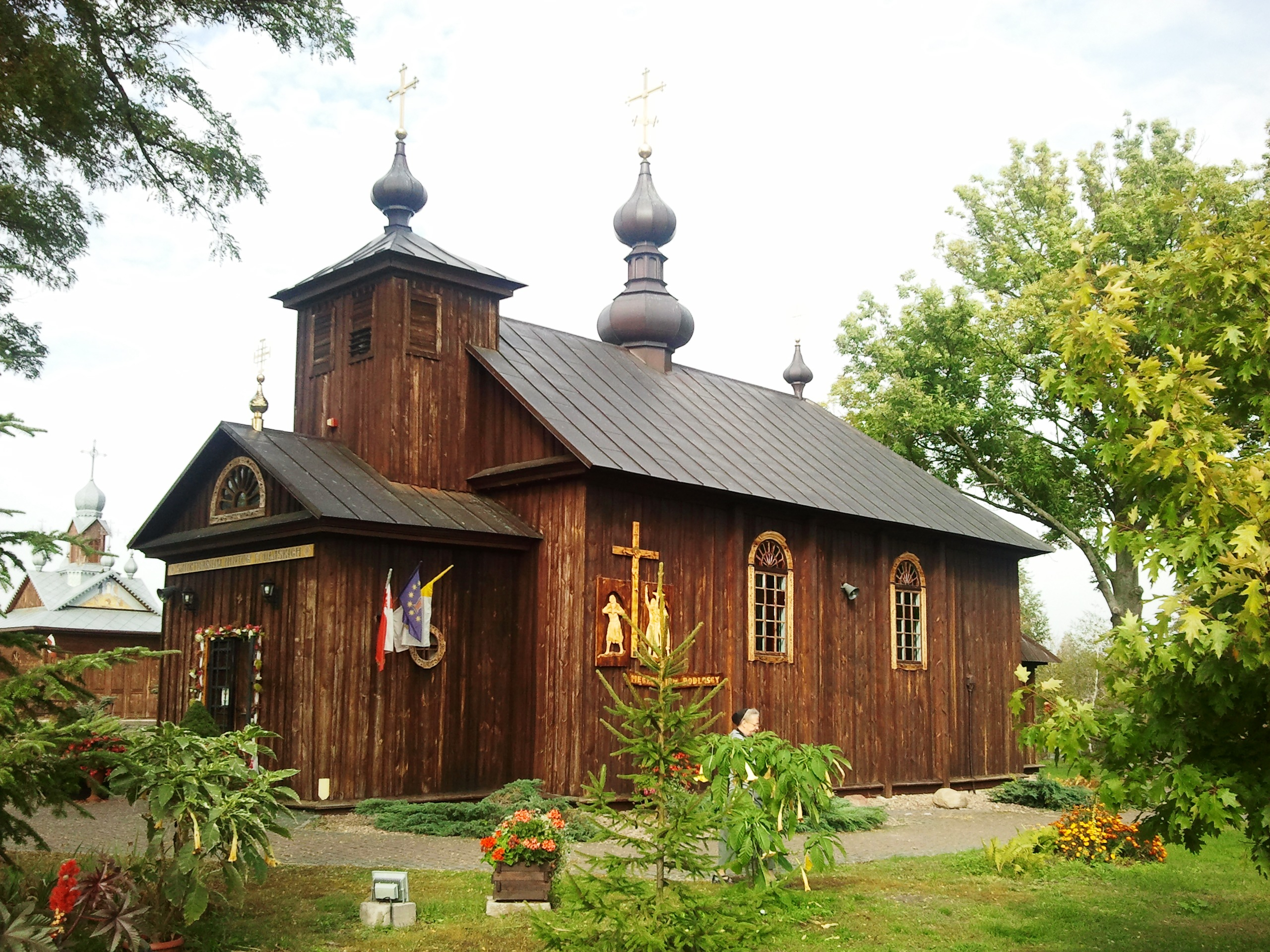 Kostomłoty, cerkiew unicka p.w. św. Nicefora, XVII